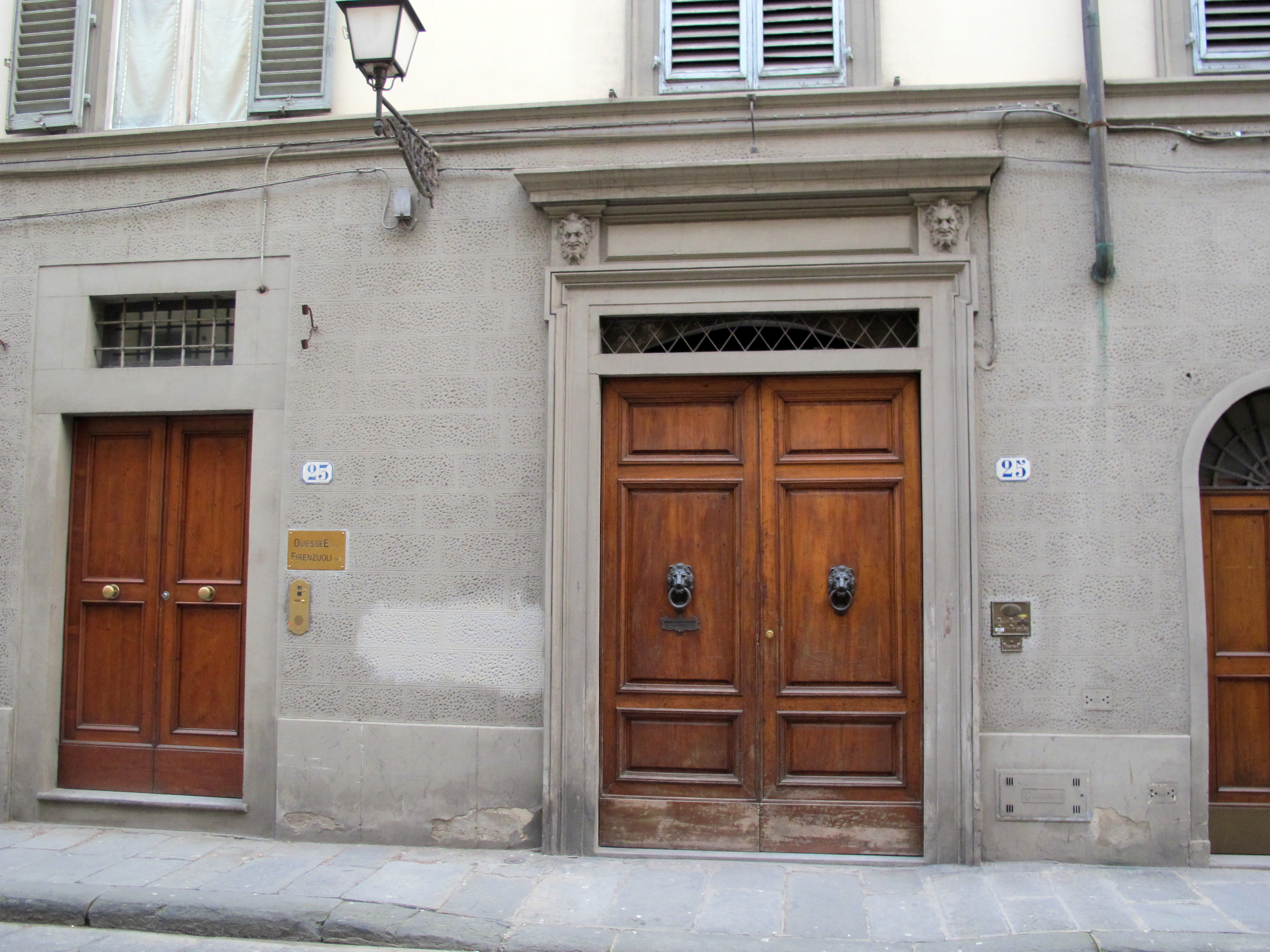 Via ghibellina 23, Ex Teatro Brendel